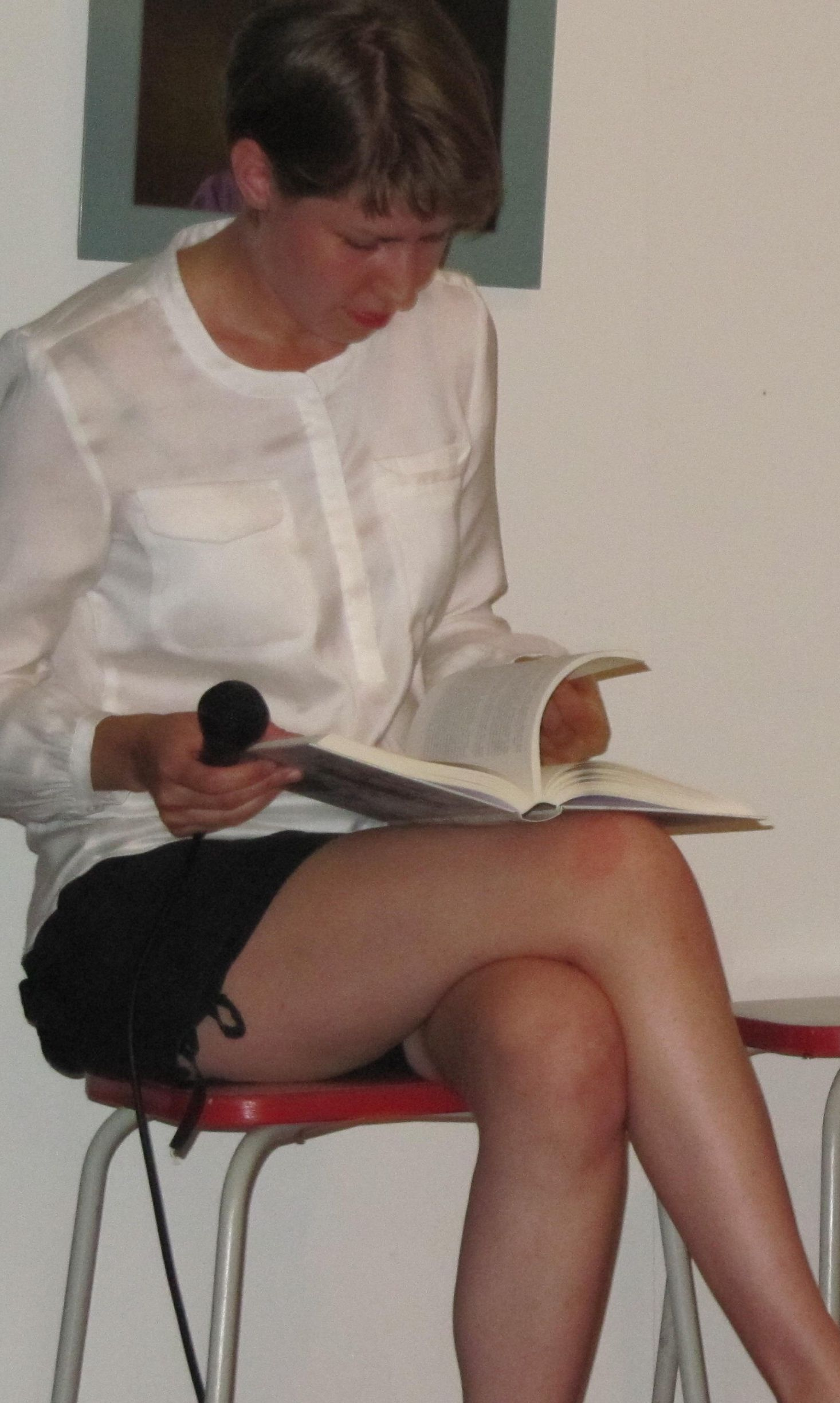 Mari Koski Ouuskunta on mahdollisuus -tapahtumassa kahvila Hertassa Tampereella 11.6.2011.